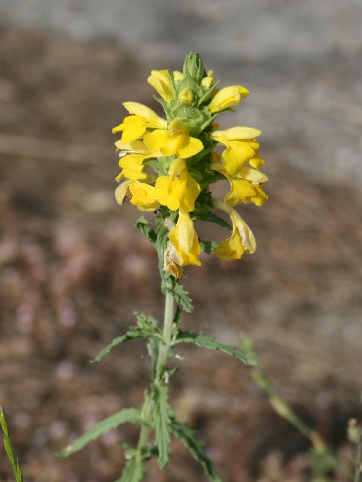 Bartsia trixago, Sommerwurzgewächse (Orobanchaceae) - Italien/Italia/Italy: Kalabrien/Calabria, Prov. Reggio Calabria, Aspromonte, bei San Peri, SSE Scilla